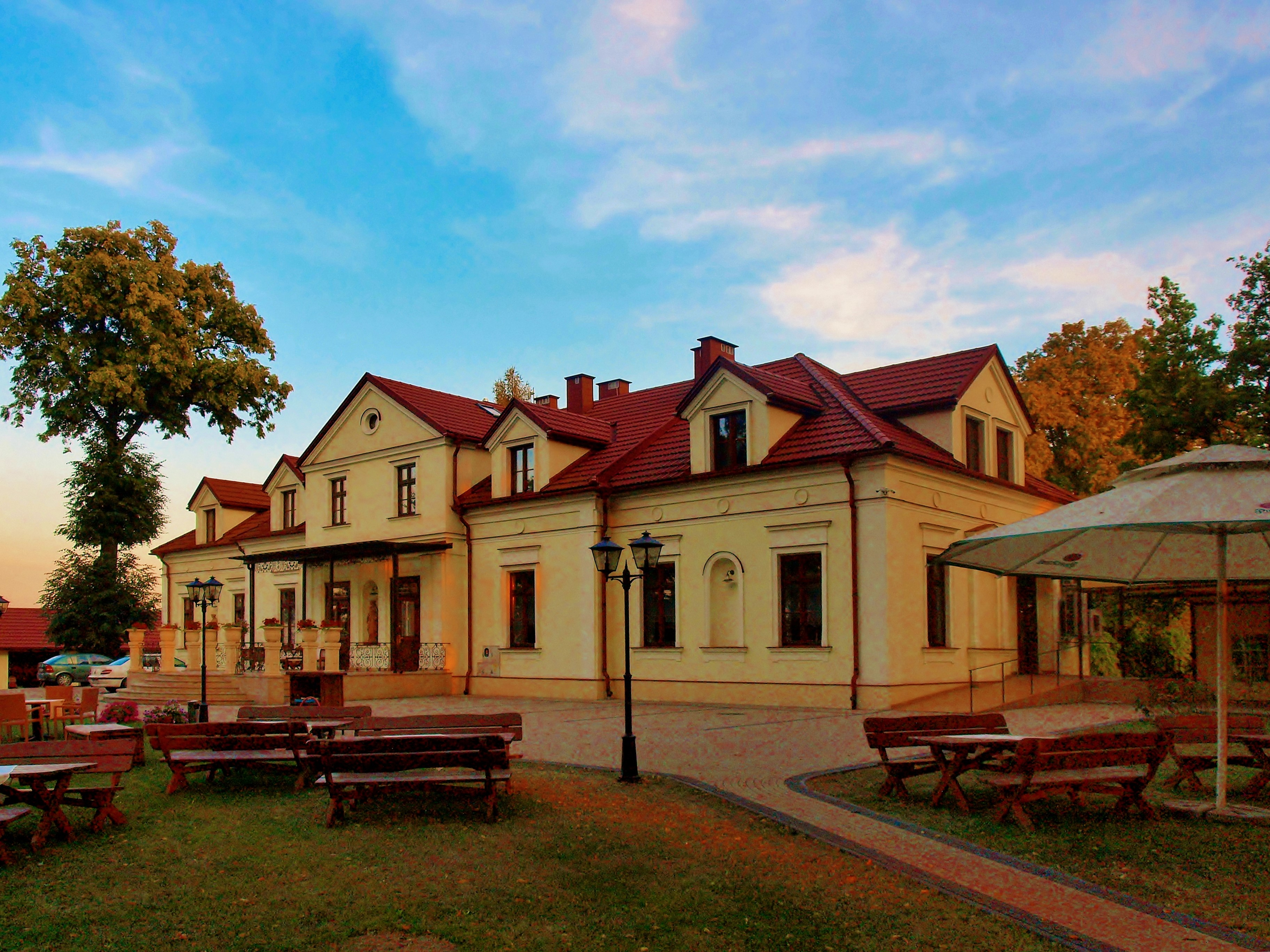 Zgłobice - dwór Marszałkowiczów